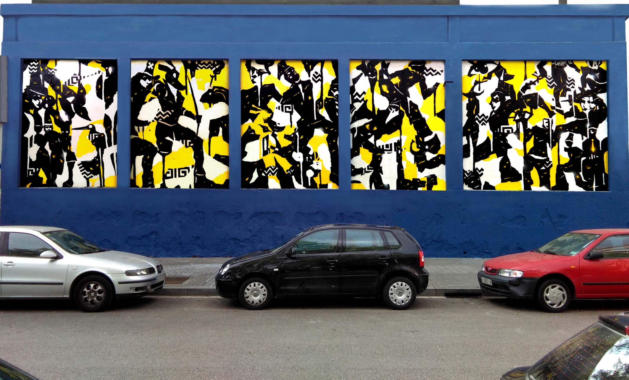 El muro completo del artista Fasim en el festival de arte urbano 'Open Walls Conference', Nau Bostik, Barcelona 2016.